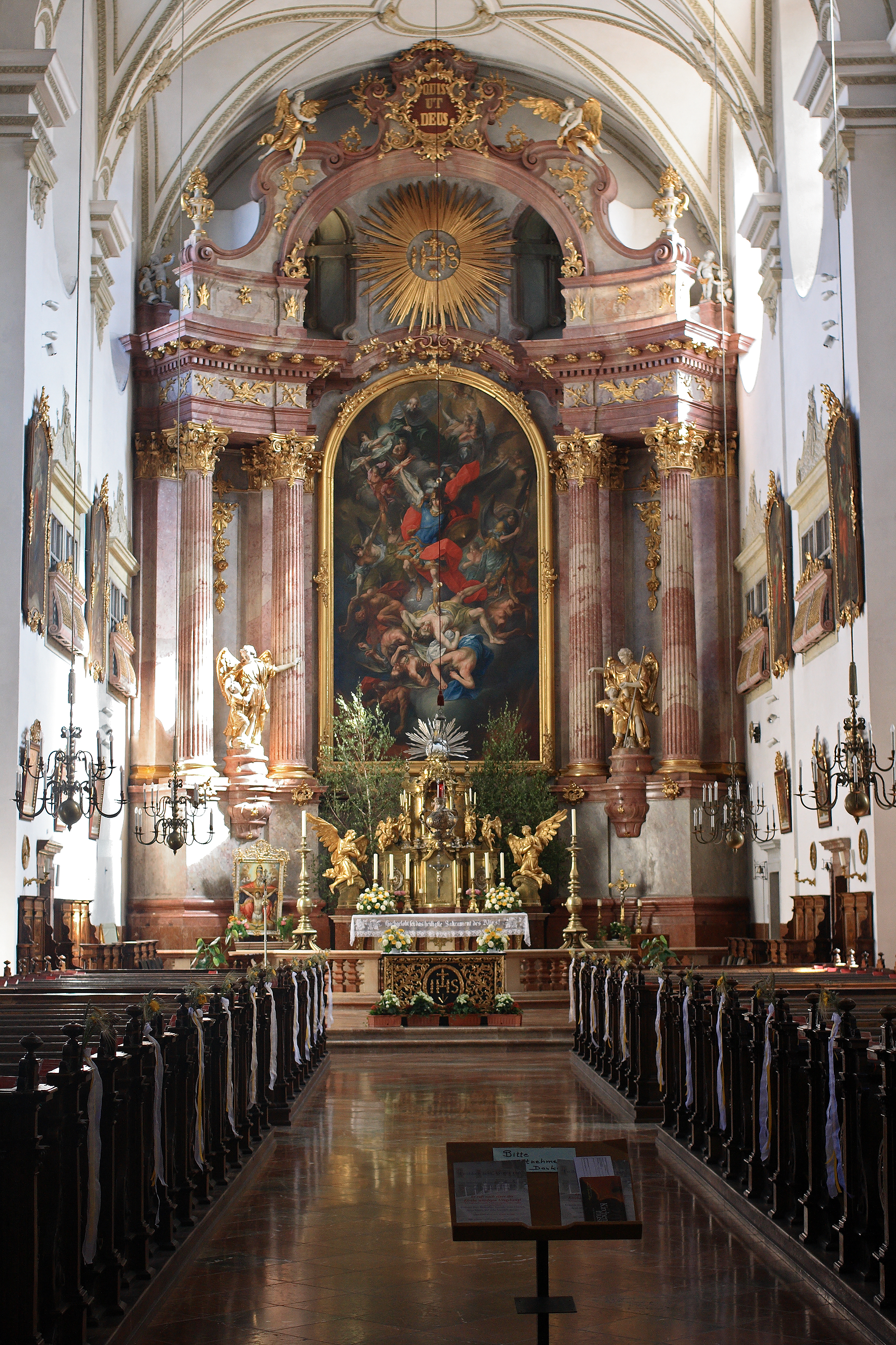 Das Innere der Steyrer Michaelerkirche